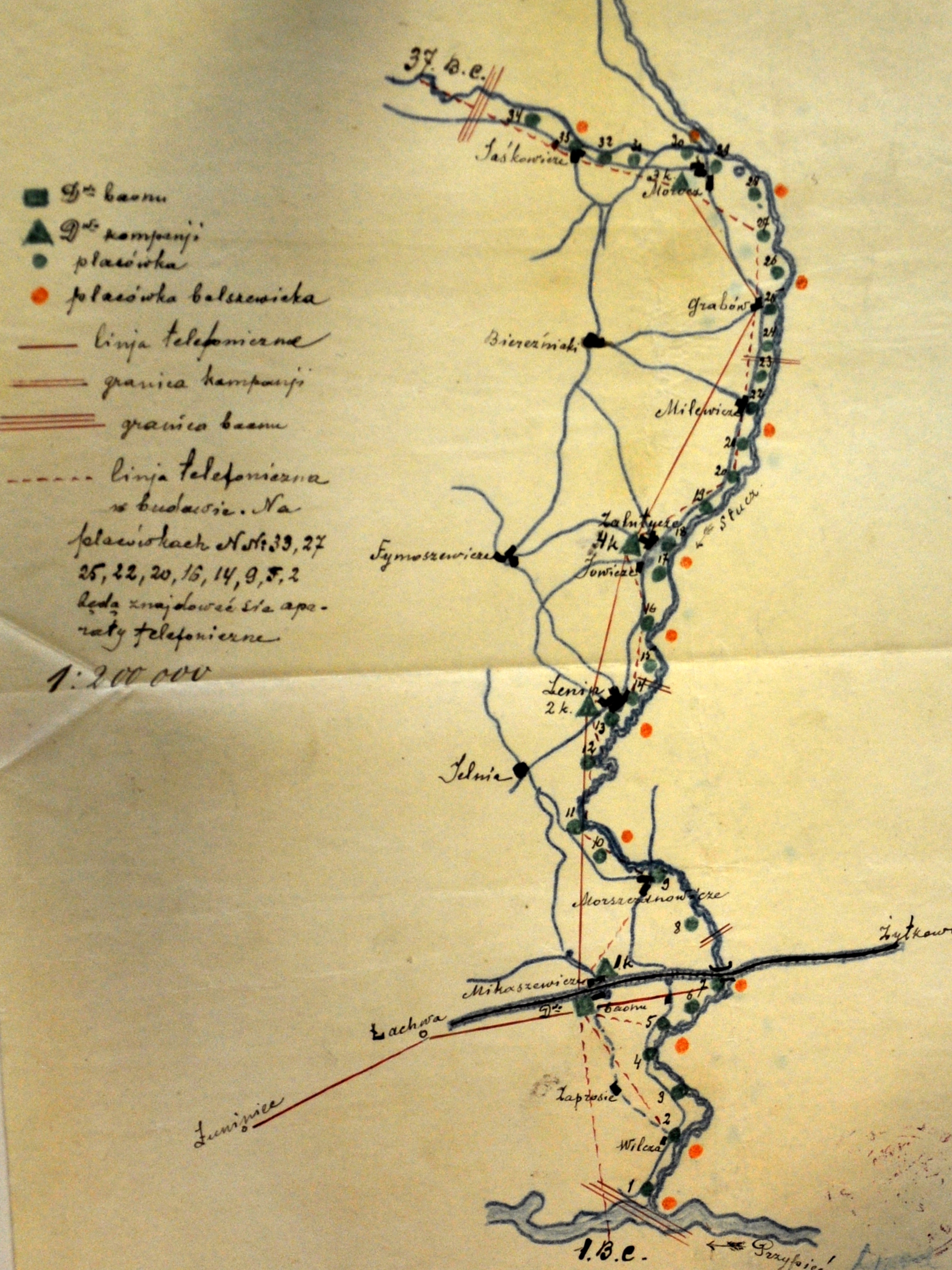 Szkic rozmieszczenia 40 batalionu celnego